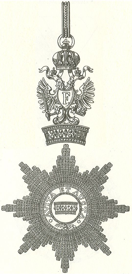 Scan van Blz. 278 en 279 van het boek "Handbuch der Ritter- und Verdienstorden " uitgegeven 1893 door Weber.Tekening van de in 1902 overleden Maximilian Gritzner. Robert Prummel 10 jul 2008 16:40 (CEST)